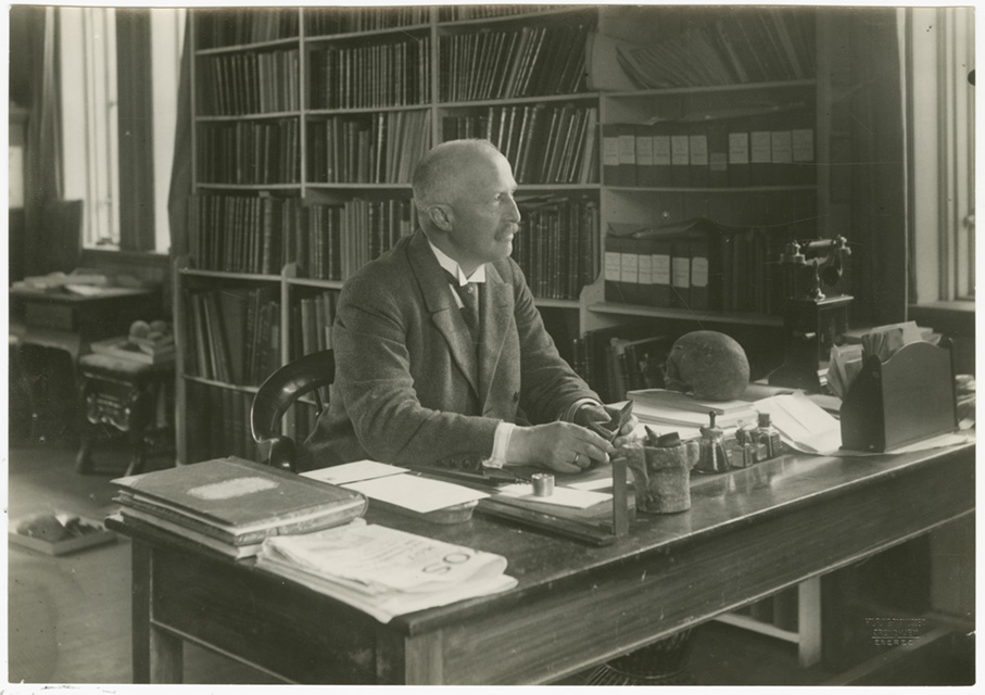 Norsk arkeolog